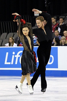 Мэдисон Чок и Эван Бейтс на этапе Гран-при Skate America 2014